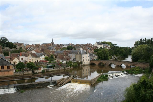 Beaumont-sur-Sarthe